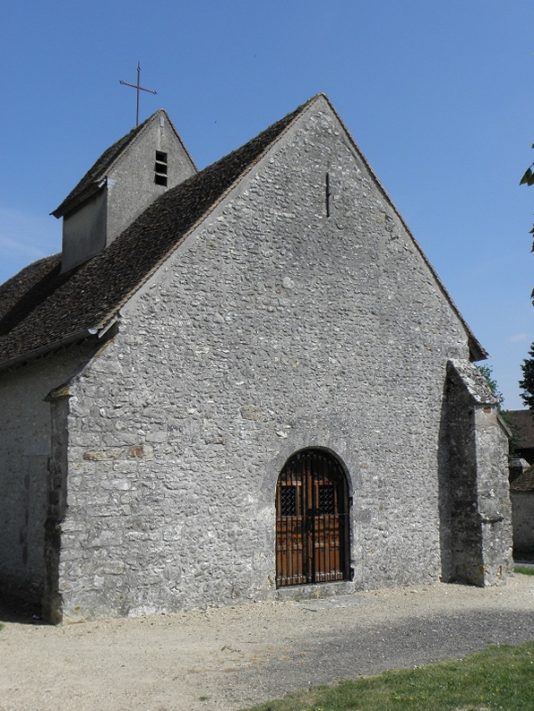 Église Saint-Sulpice à La Chapelle-Saint-Sulpice (77).